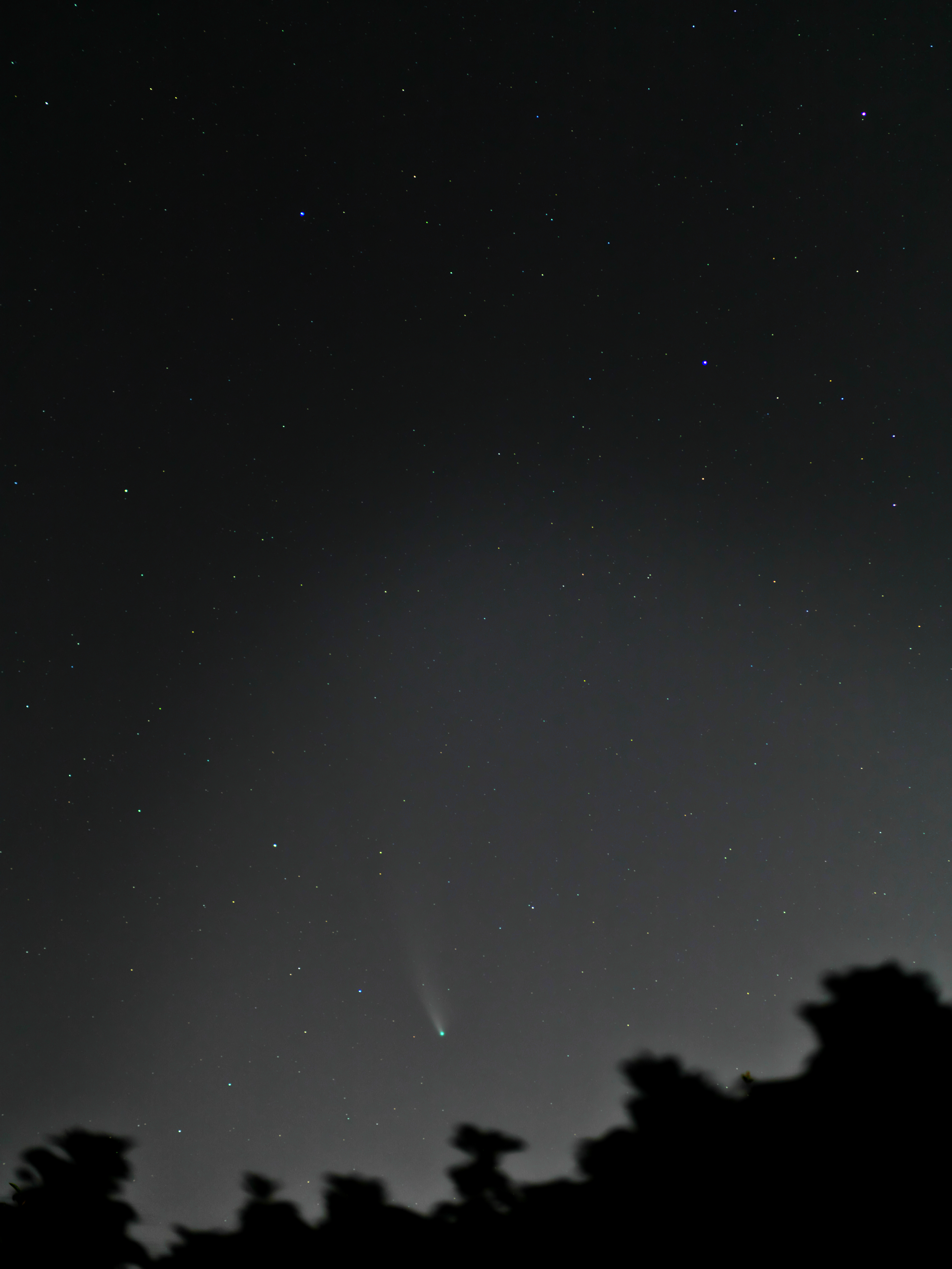 Der Komet C/2020 F3 (NEOWISE) am nördlichen Nachthimmel über Berlin. Der Komet befindet sich in der Mitte zwischen den drei Sternen 3. Größenklasse psi, lambda und my Ursae Majoris im Sternbild Großer Bär (Ursa Major). Etwas links oberhalb der Stern omega Ursae Majoris (4. Größenklasse). Hinter dem Schweif des Kometen sind Sterne 10. Größenklasse zu erkennen.